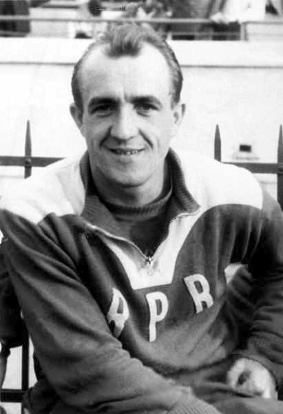 Vasile Zavoda